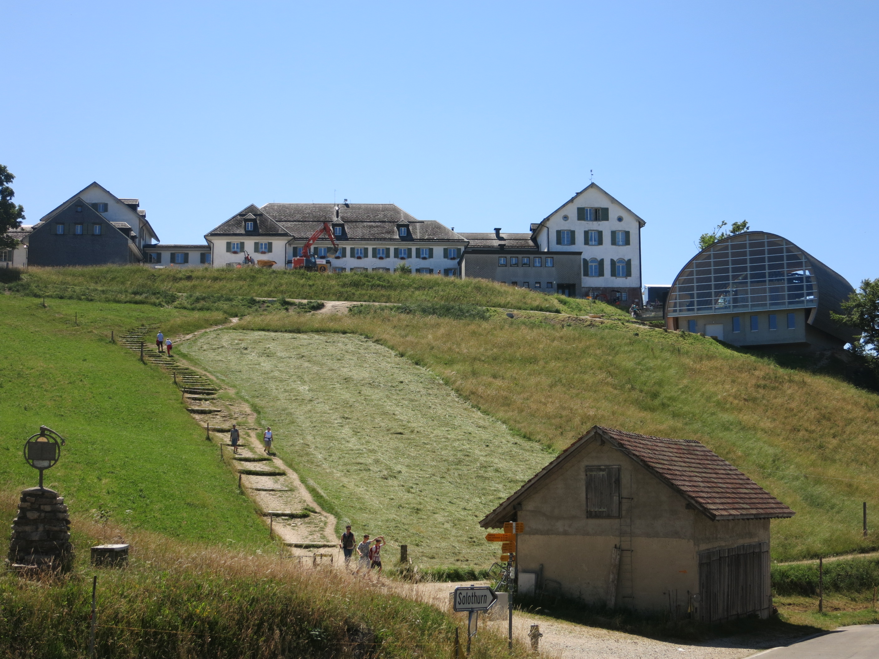 Weissenstein, Oberdorf SO, Schweiz